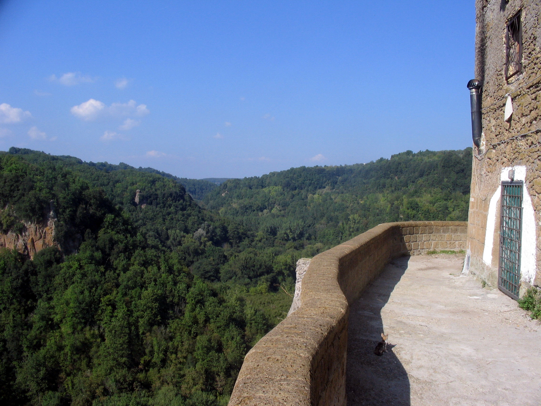 Calcata, Lazio, Italia